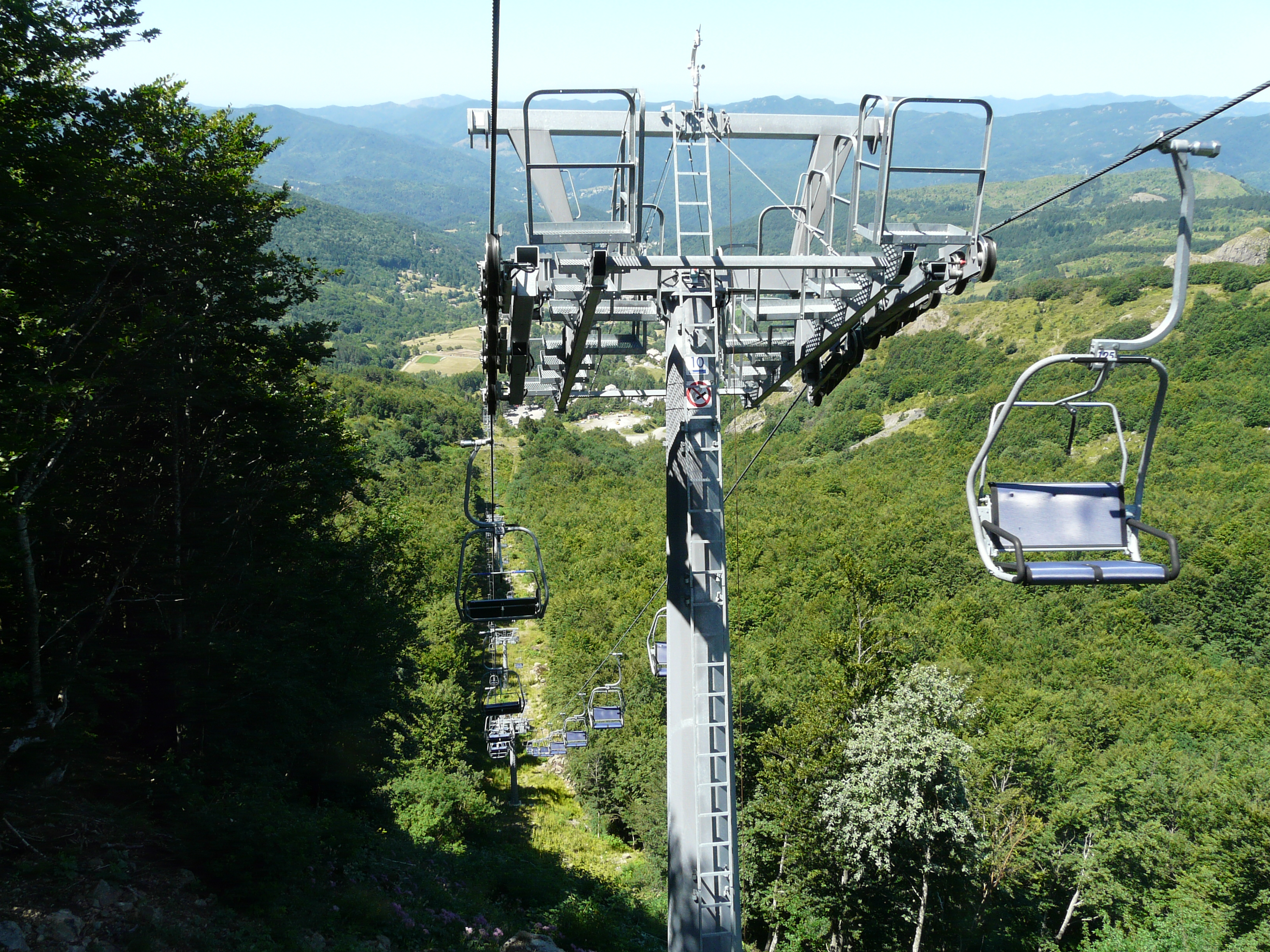 Prato della Cipolla, Santo Stefano d'Aveto, Liguria, Italia